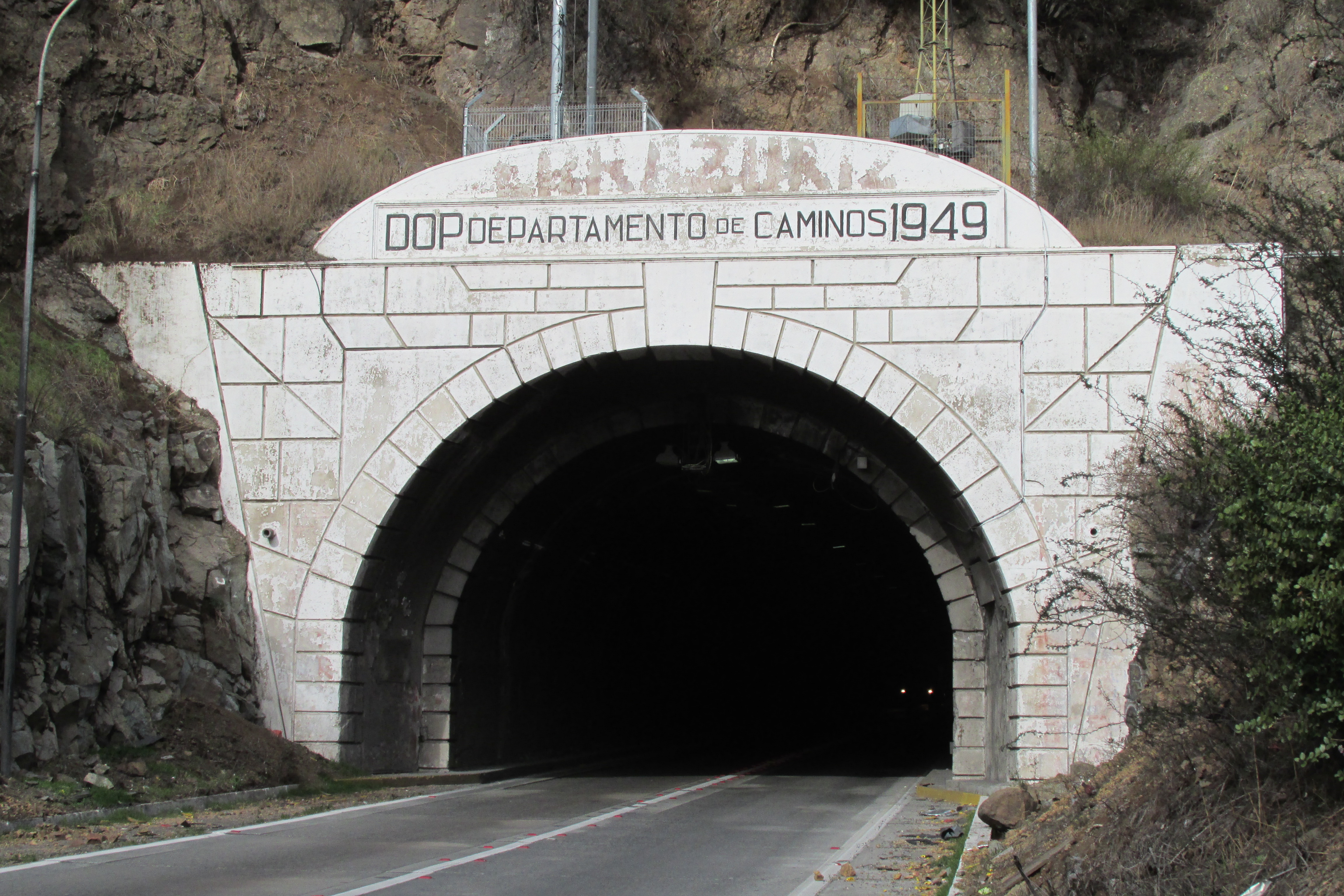 Túnel Angostura, salida norte, ubicado en Ruta 5 Sur, región Metropilitana. Construido en 1949